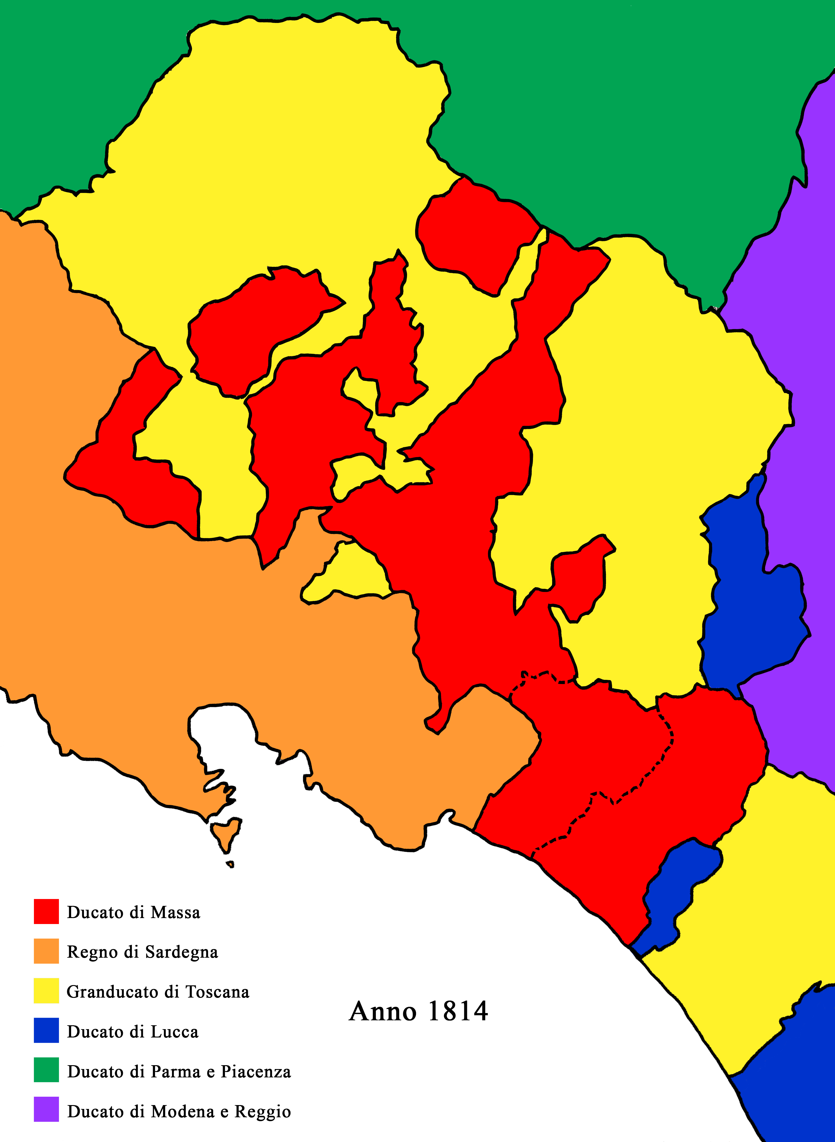 Il Ducato di Massa nel 1814 in seguito al Congresso di Vienna, al momento della sua massima espansione in seguito all'acquisizione degli ex feudi malaspiniani della Lunigiana, annessi l'anno successivo al Ducato di Modena e Reggio